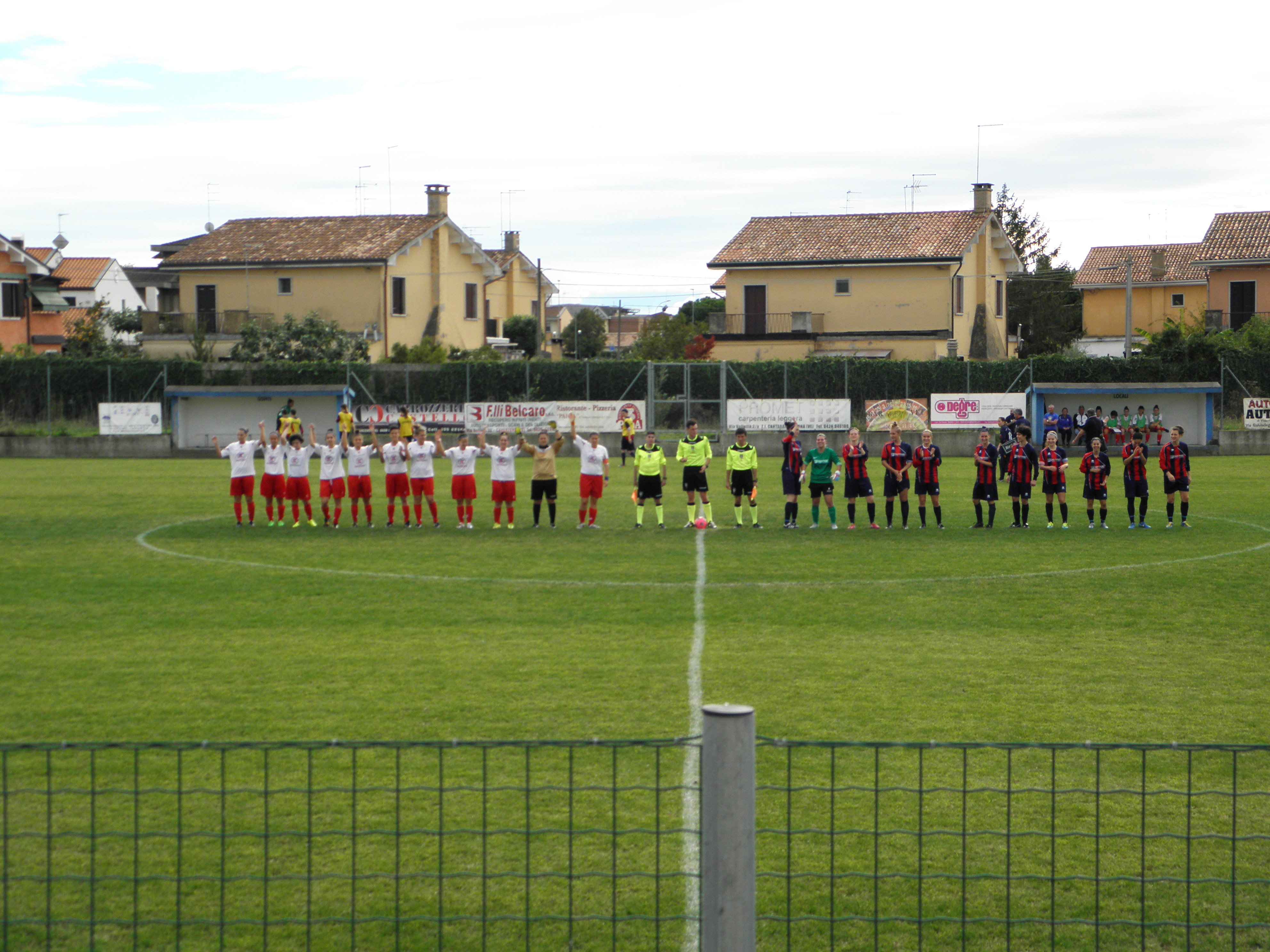 Cavarzere, Stadio Peppino Di Rorai, 11 ottobre 2015: Gordige-Vittorio Veneto, partita valida per le fasi preliminari di Coppa Italia 2015-2016.